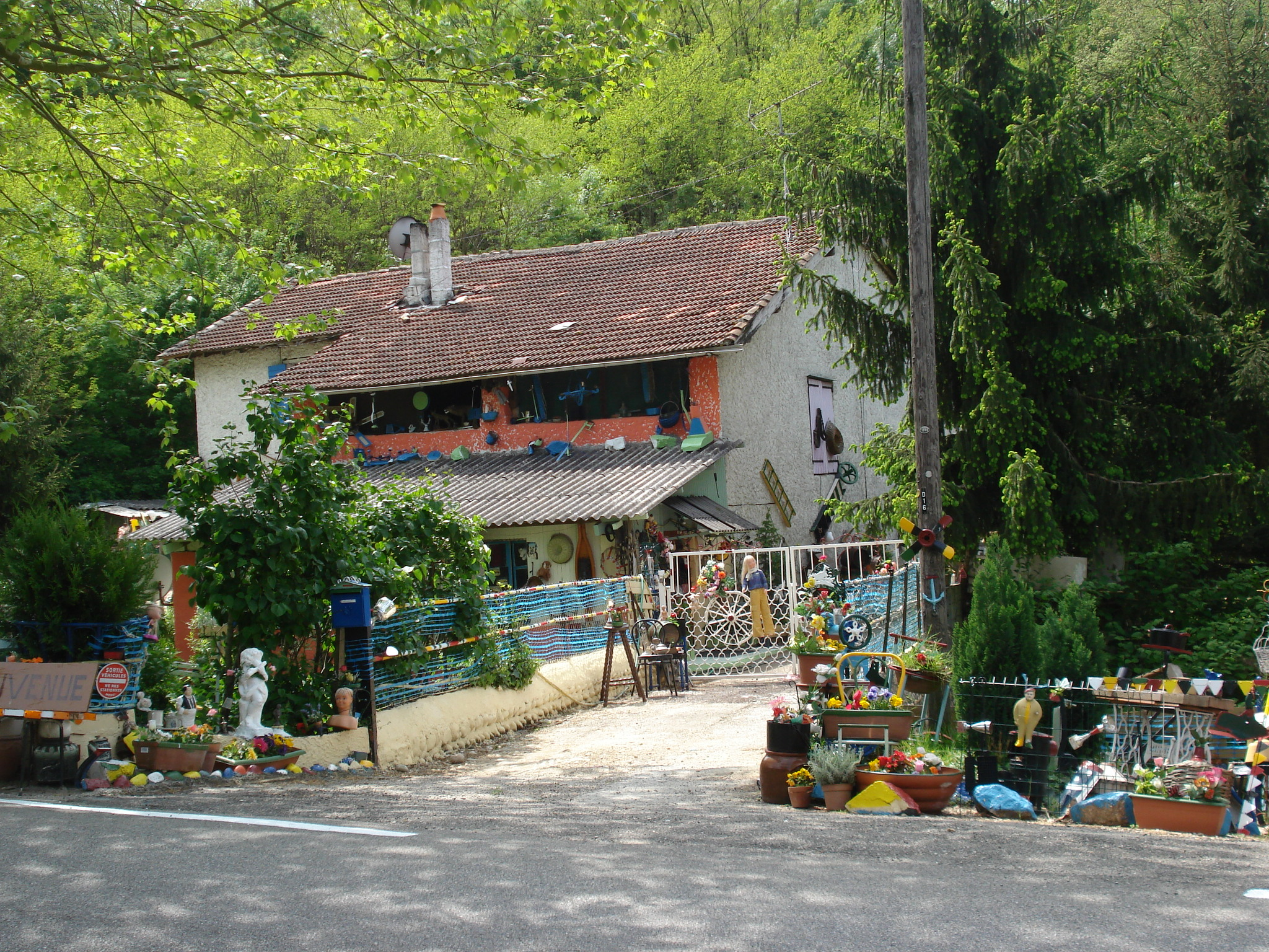 maison décorée par de multiples objets de Brocante peints en couleurs vives par "le marin" à Lens-Lestang dans la Drôme